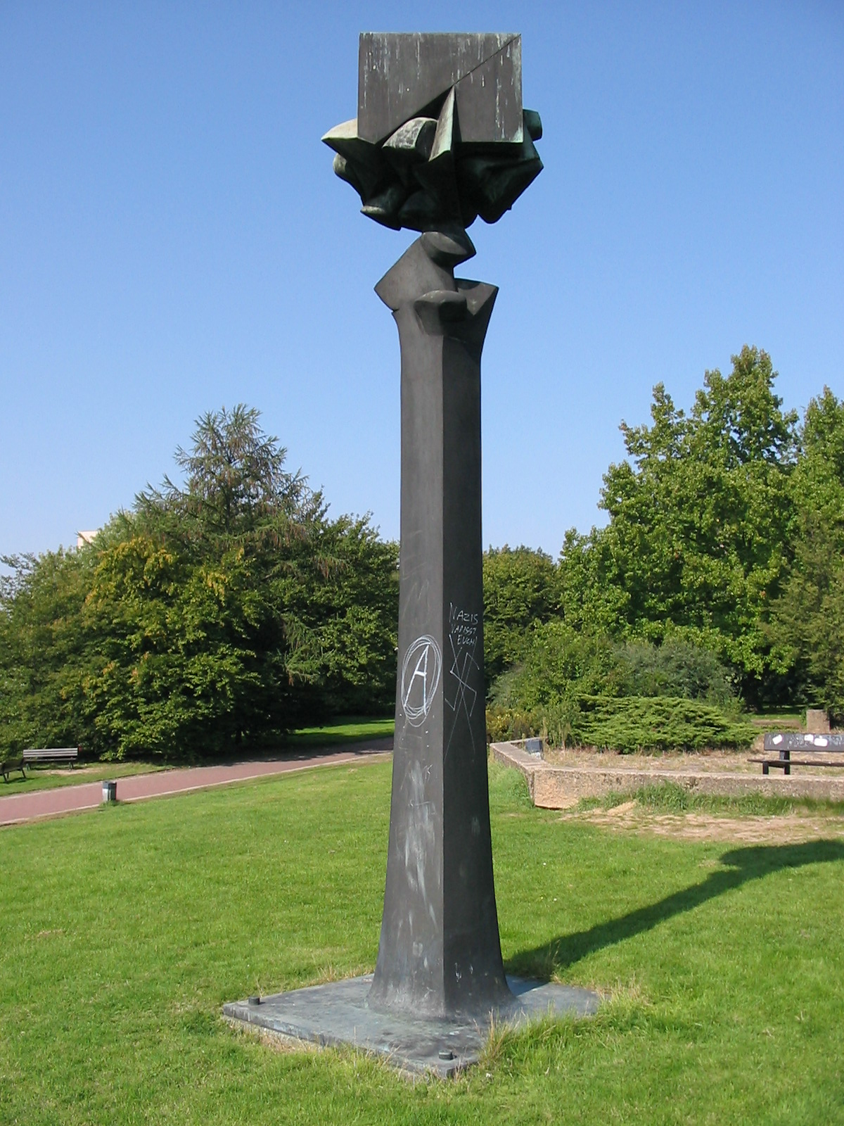 Braunschweig, Säule im Viewegs Garten